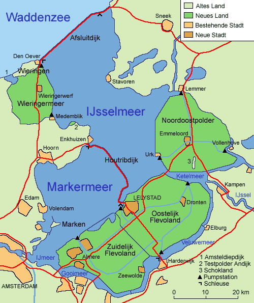 Karte der Zuiderzeewerke in den Niederlanden